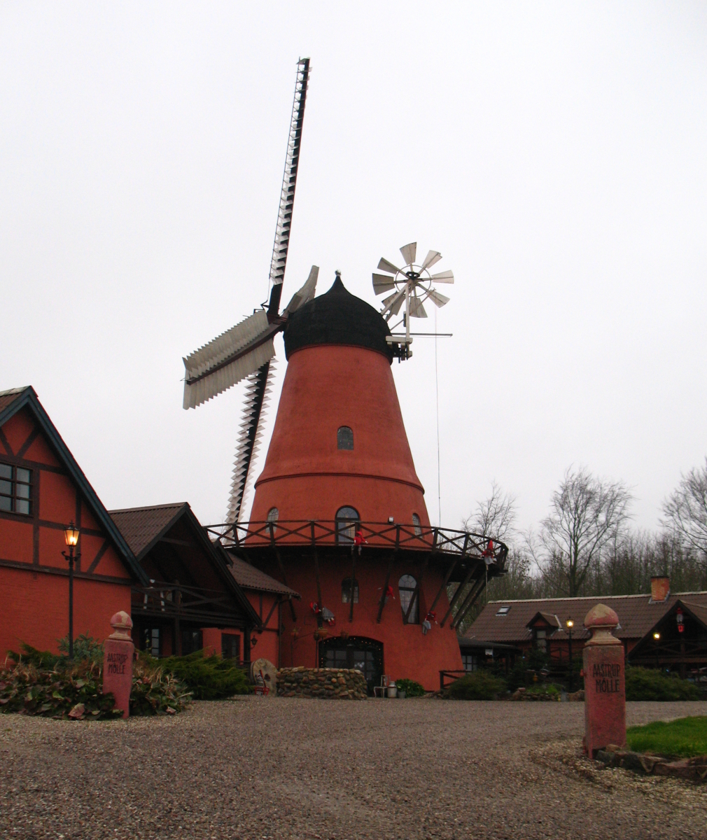 Åstrup Mølle, Svendborgvej 303, 5600 Faaborg Eget foto, Noorse Licentie: CC-BY-SA-3.0 Forminsket versjon for Wikipedia